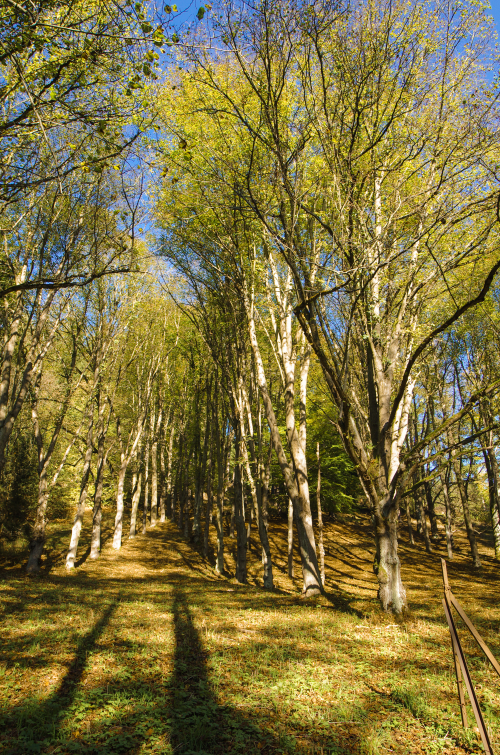 památné stromy - Stromořadí princezny Marie, okres Karlovy Vary